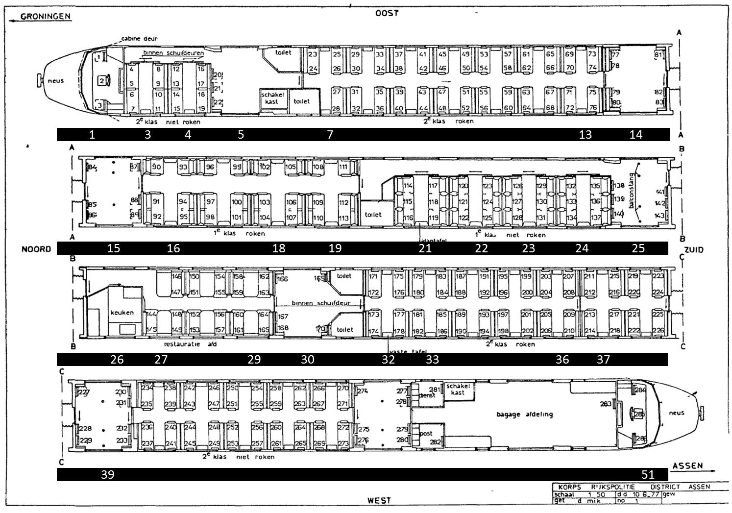 Schema's van de indeling van de trein ende gebeurtenissen uit het rapport "Beëindiging van de gijzeling bij De Punt in 1977" uit 2014. Bijlage 5 Plattegrond trein